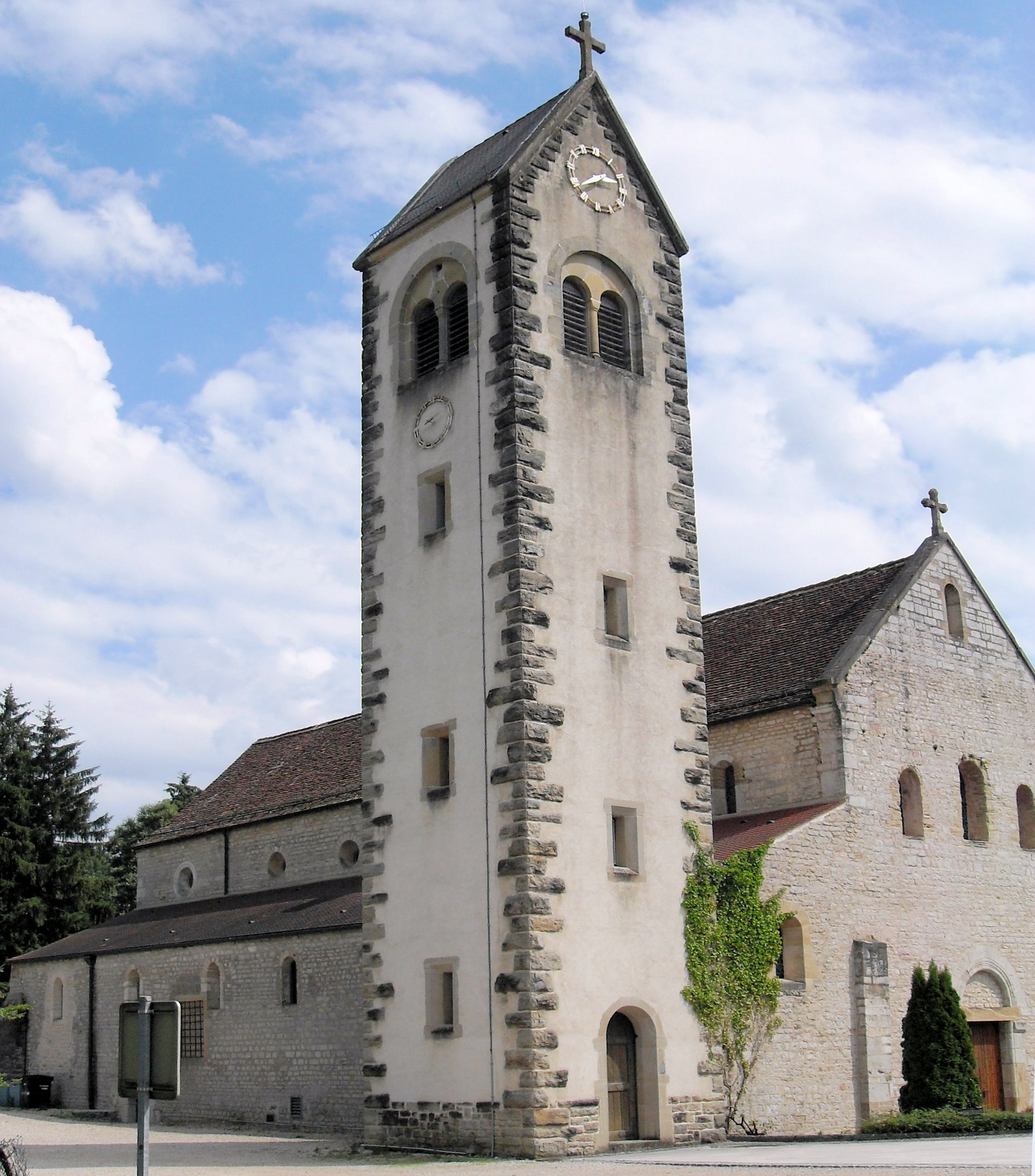 L'église Saint-Jacques-le-Mayeur à Feldbach